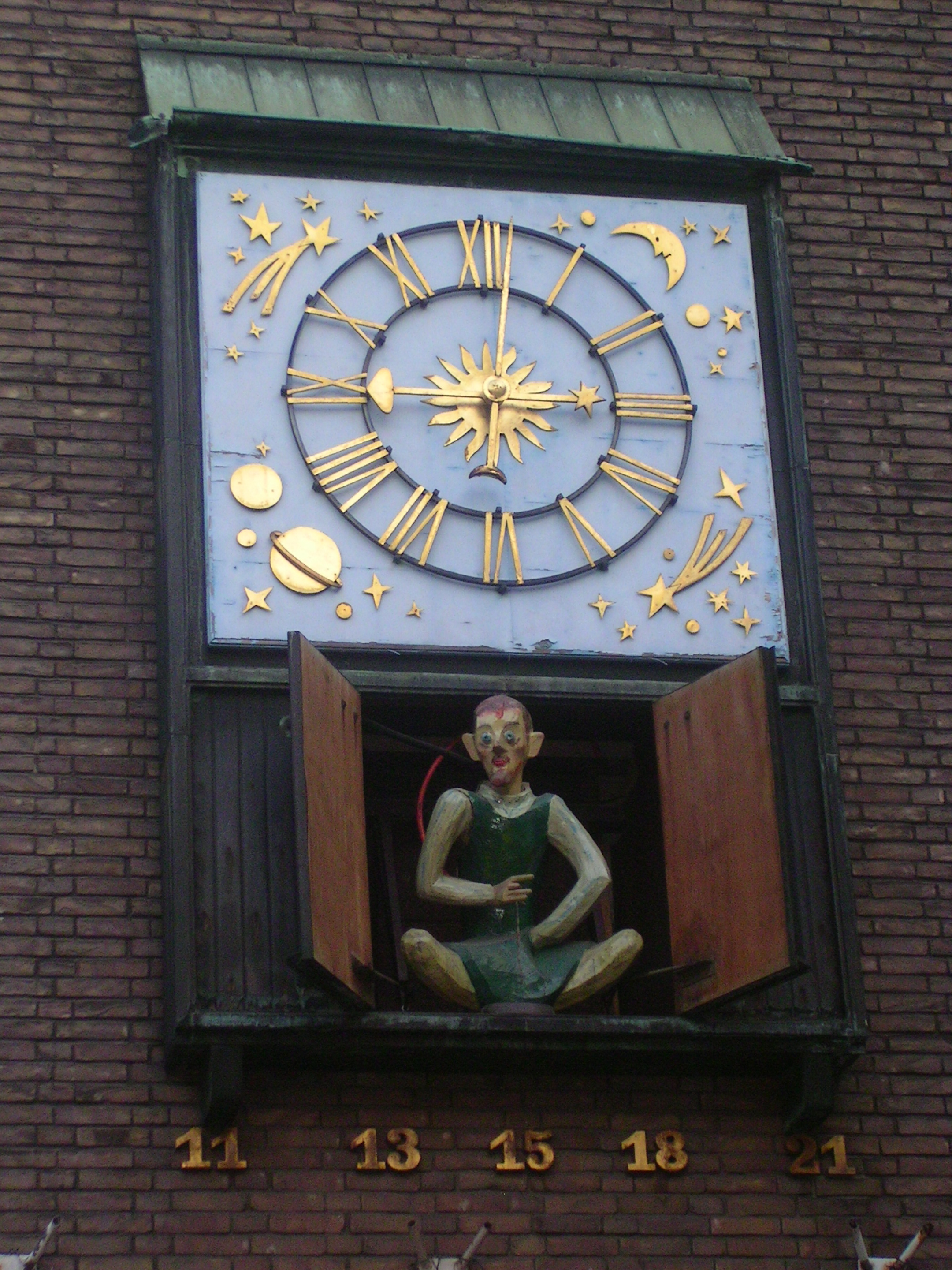 Schneider Wibbel-Spieluhr in der Schneider Wibbel-Gasse in Düsseldorf